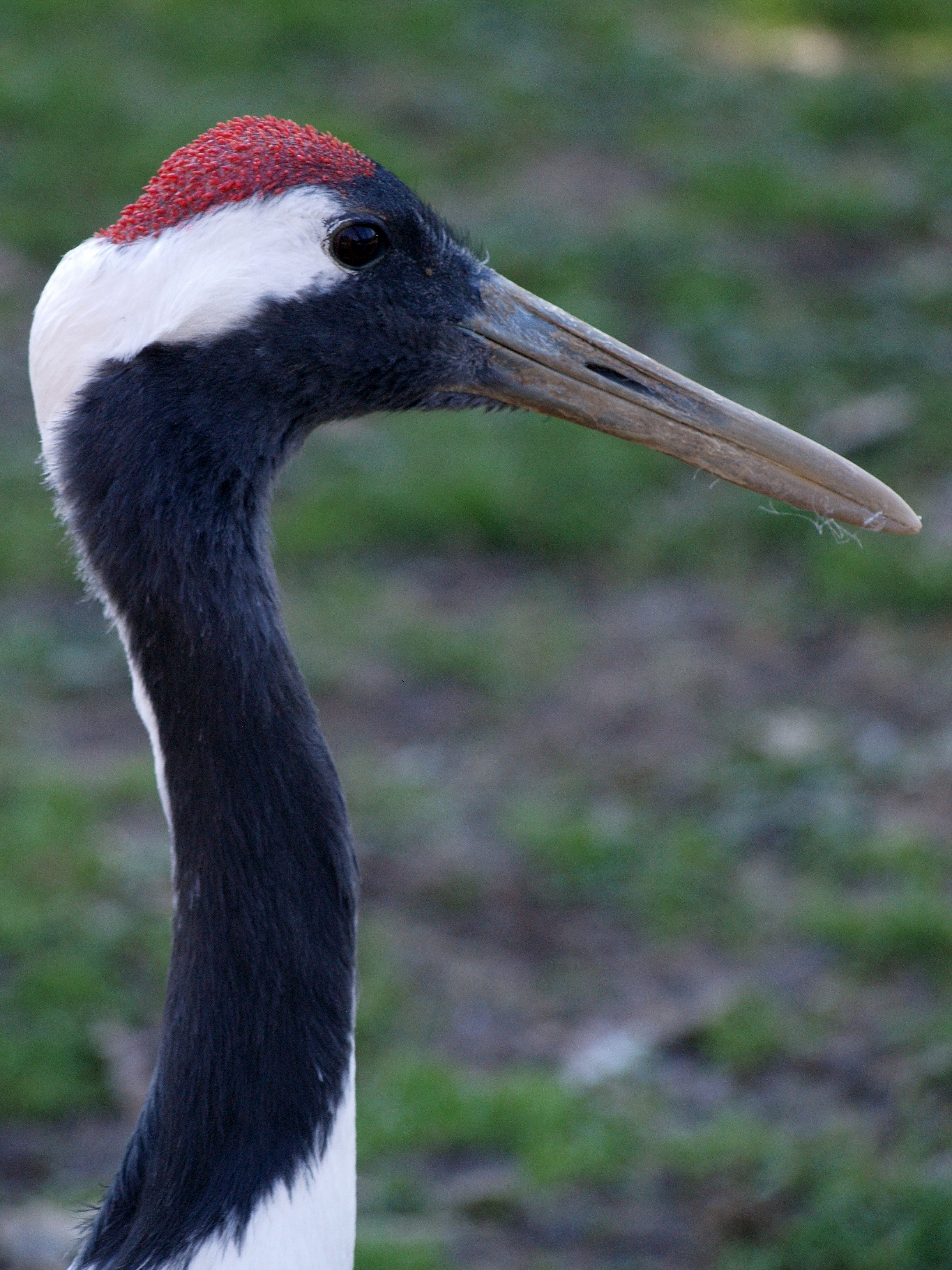 Parco faunistico le Cornelle (GRU della MANCIURIA)